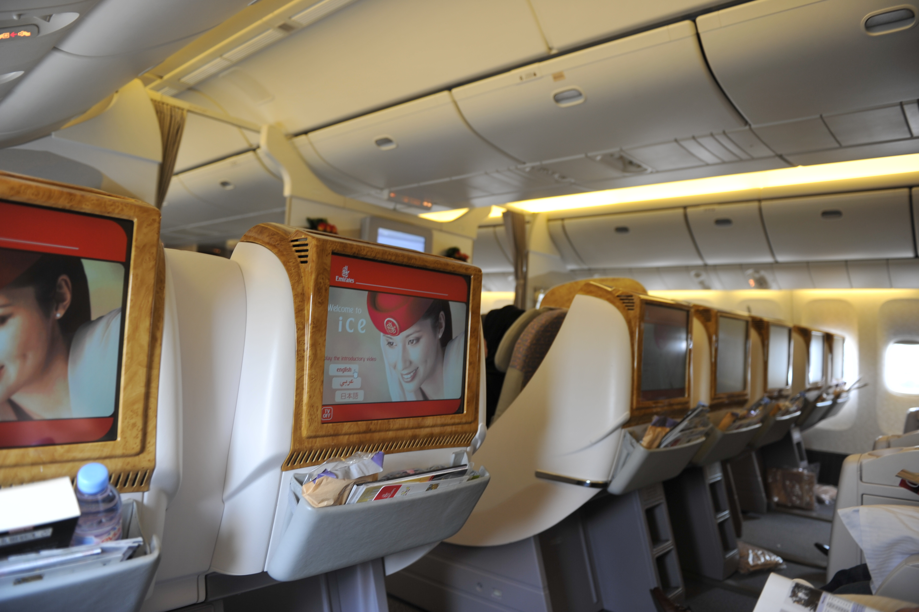 Emirates